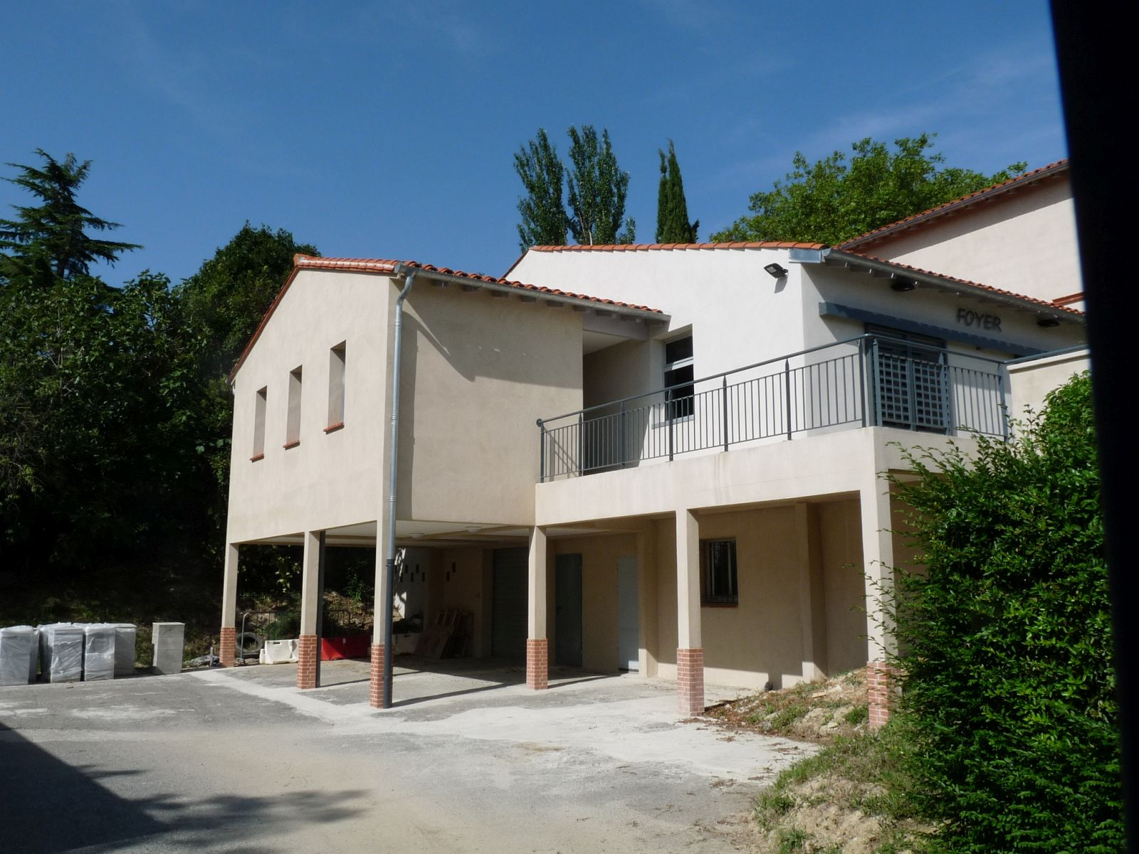 Salle des fêtes et foyer, Vieillevigne, Haute-Garonne, France